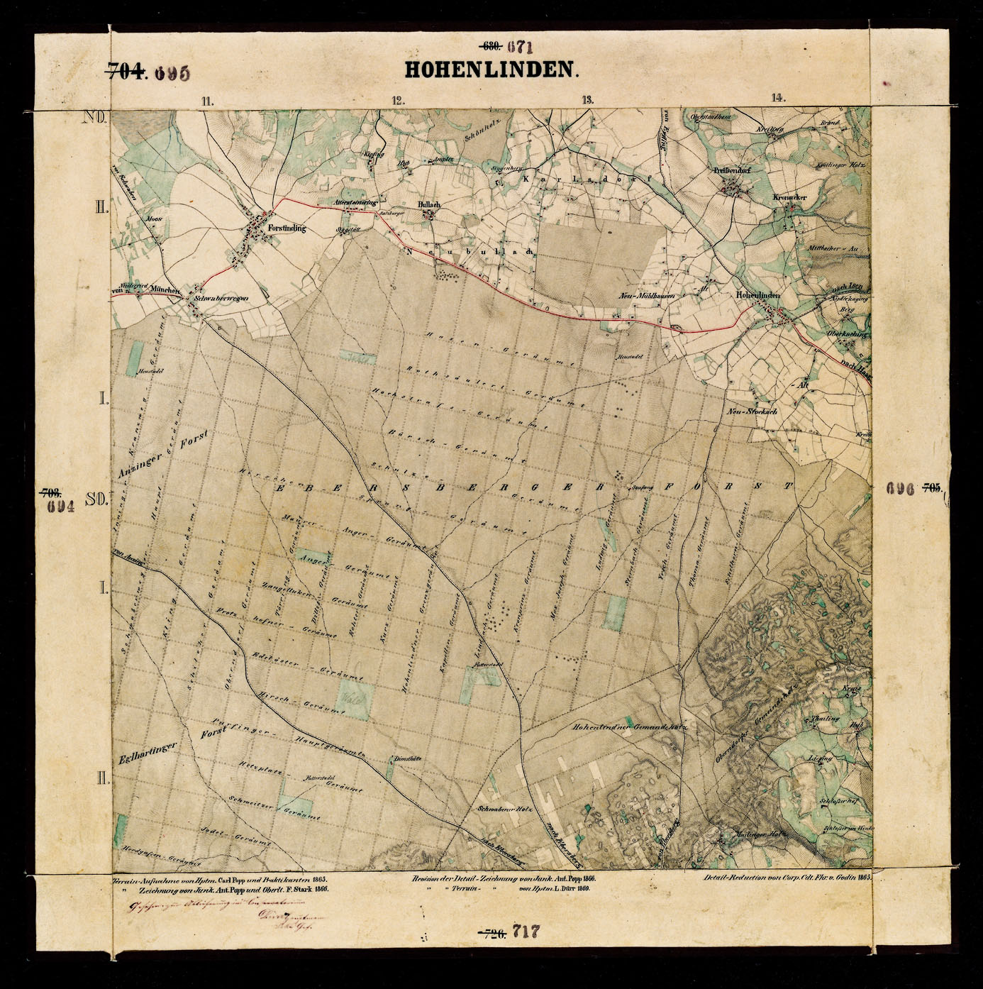 Blatt 695 "Hohenlinden" (u.a. mit dem Ebersberger Forst) der Urpositionsblätter der Landesaufnahme Bayern im 19. Jahrhundert